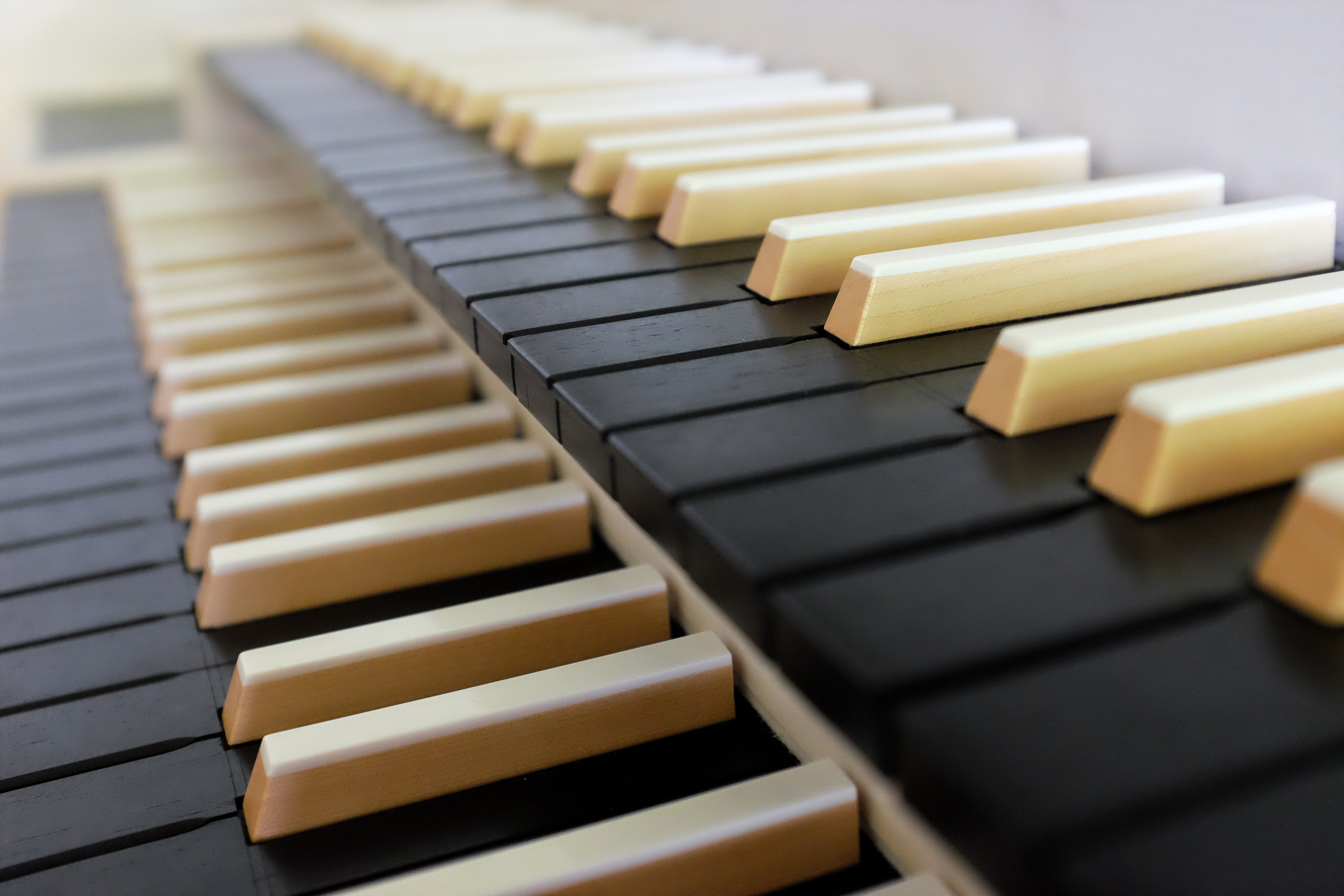 Orgelklaviatur mit Mammutelfenbeinm Ebenholz und Ahorn